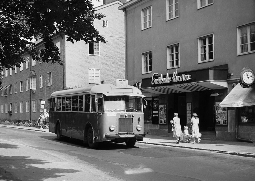 Buss på Nynäsvägen 317 vid biografen Enskede Kvarn. Biografen låg i fastigheten Nutiden 1. Det bortre huset på bilden är fastigheten Framtiden 1.